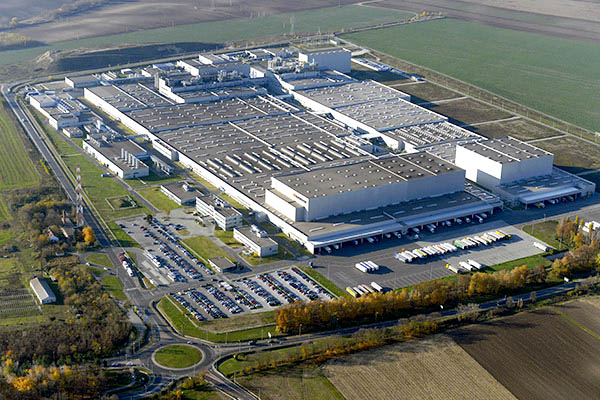 Hankook Tire magyarországi üzeme